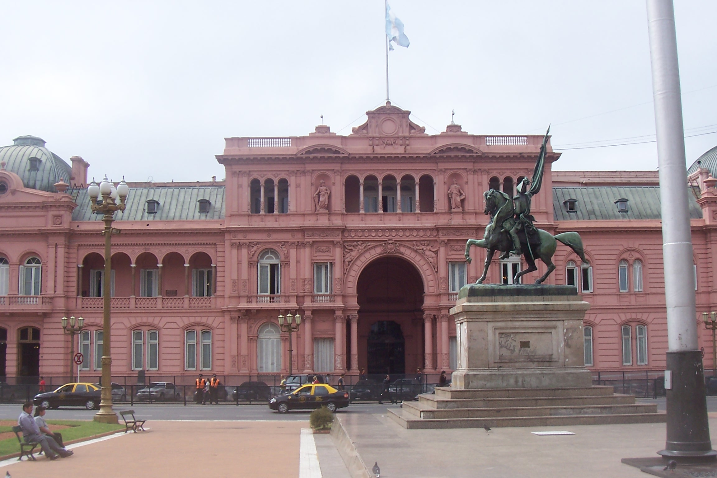 Casa de Gobierno